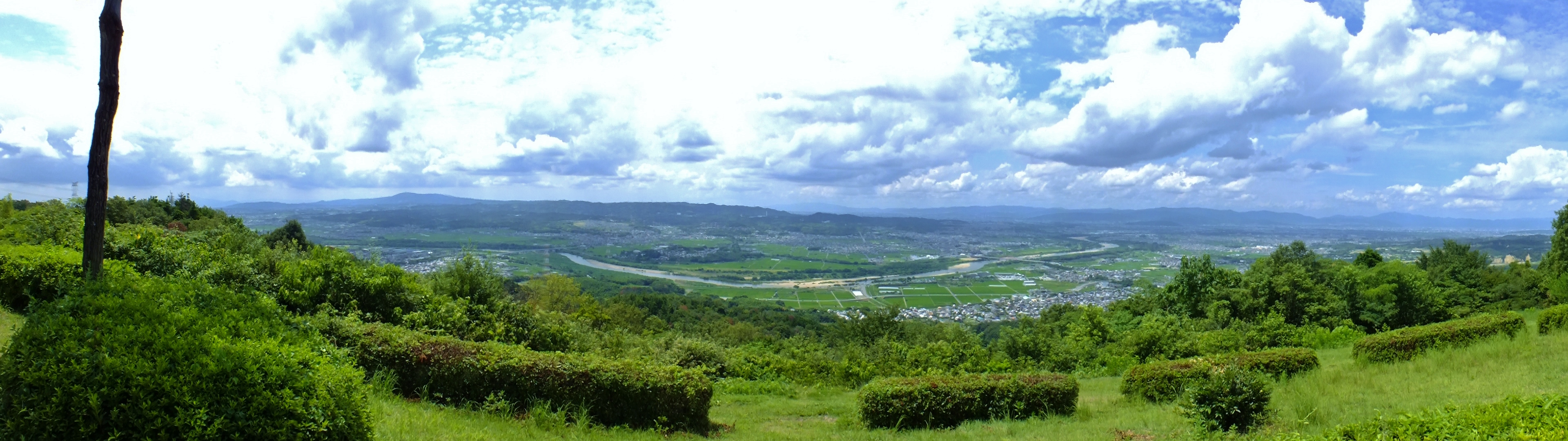 万灯呂山展望台